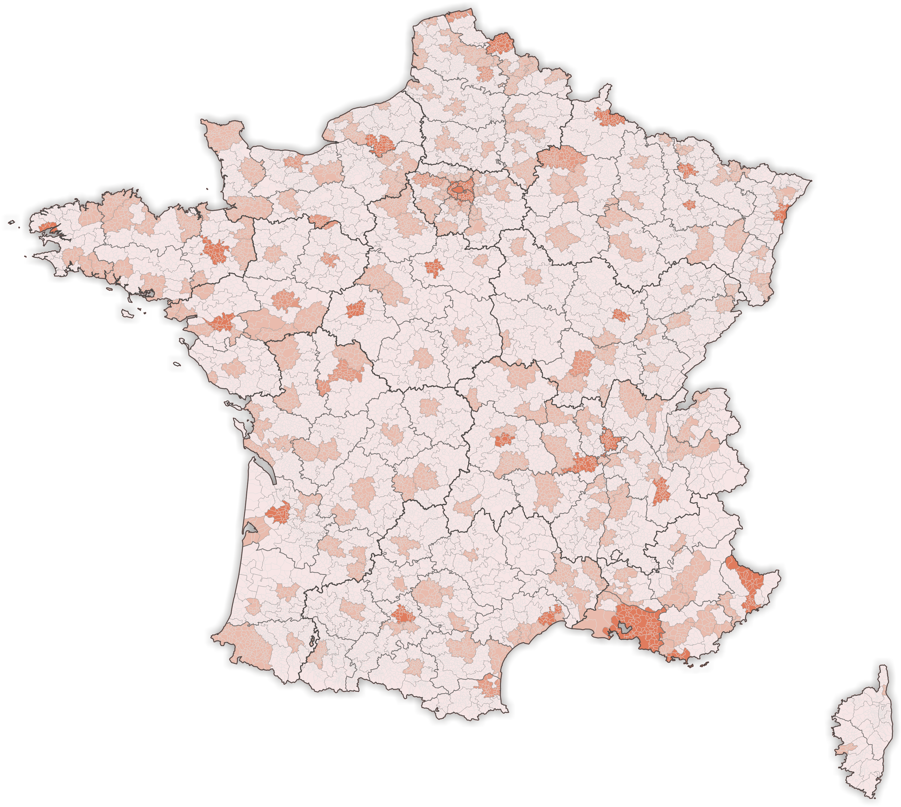 Gemeindeverbände in Frankreich